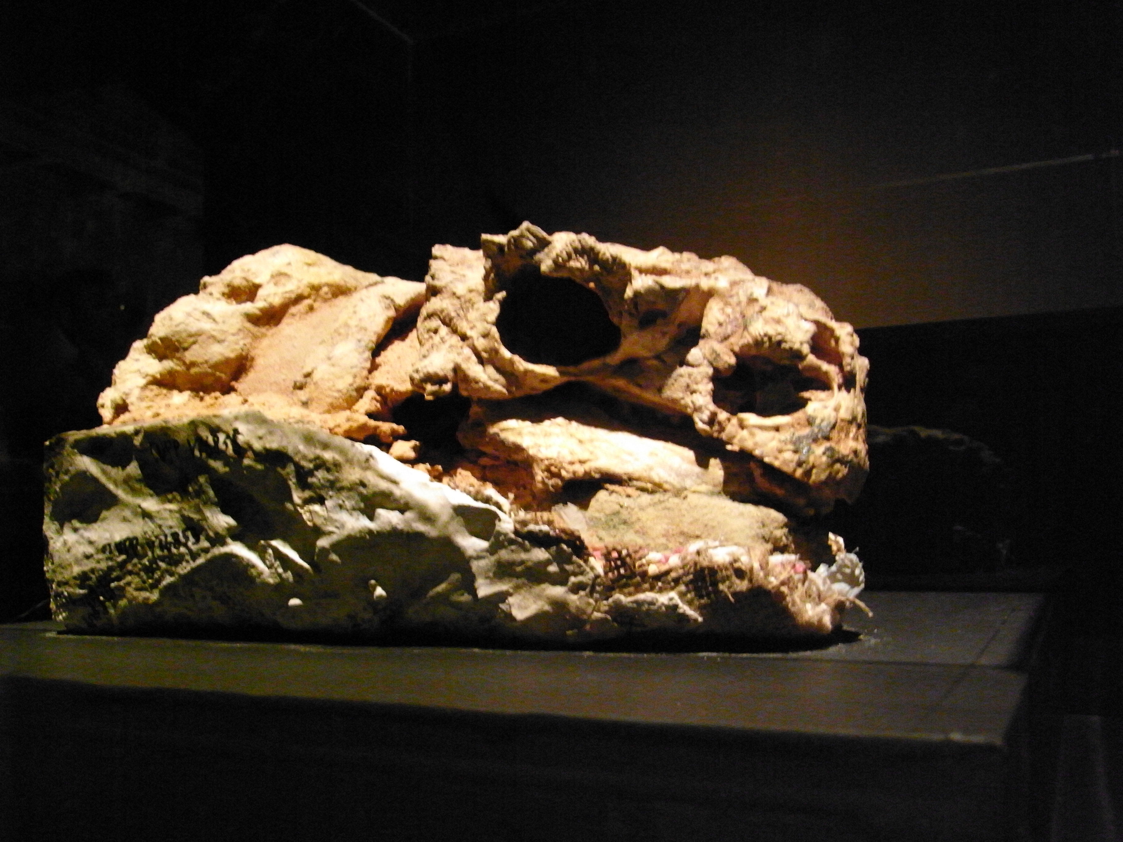 白亜紀後期のピナコサウルス。 なんて可愛い名前なんだ。